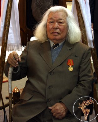 Монгуша Борахович Кенин-Лопсан на выставке Национального музея Республики Тыва "Зов бубнов", 2010 г. 85-летие ученого, шамановеда, этногрфа, доктора исторических наук, обладателя звания "Живое сокровище шаманизма"американского фонда по исследованию шаманизма, заслуженного деятеля науки и культуры